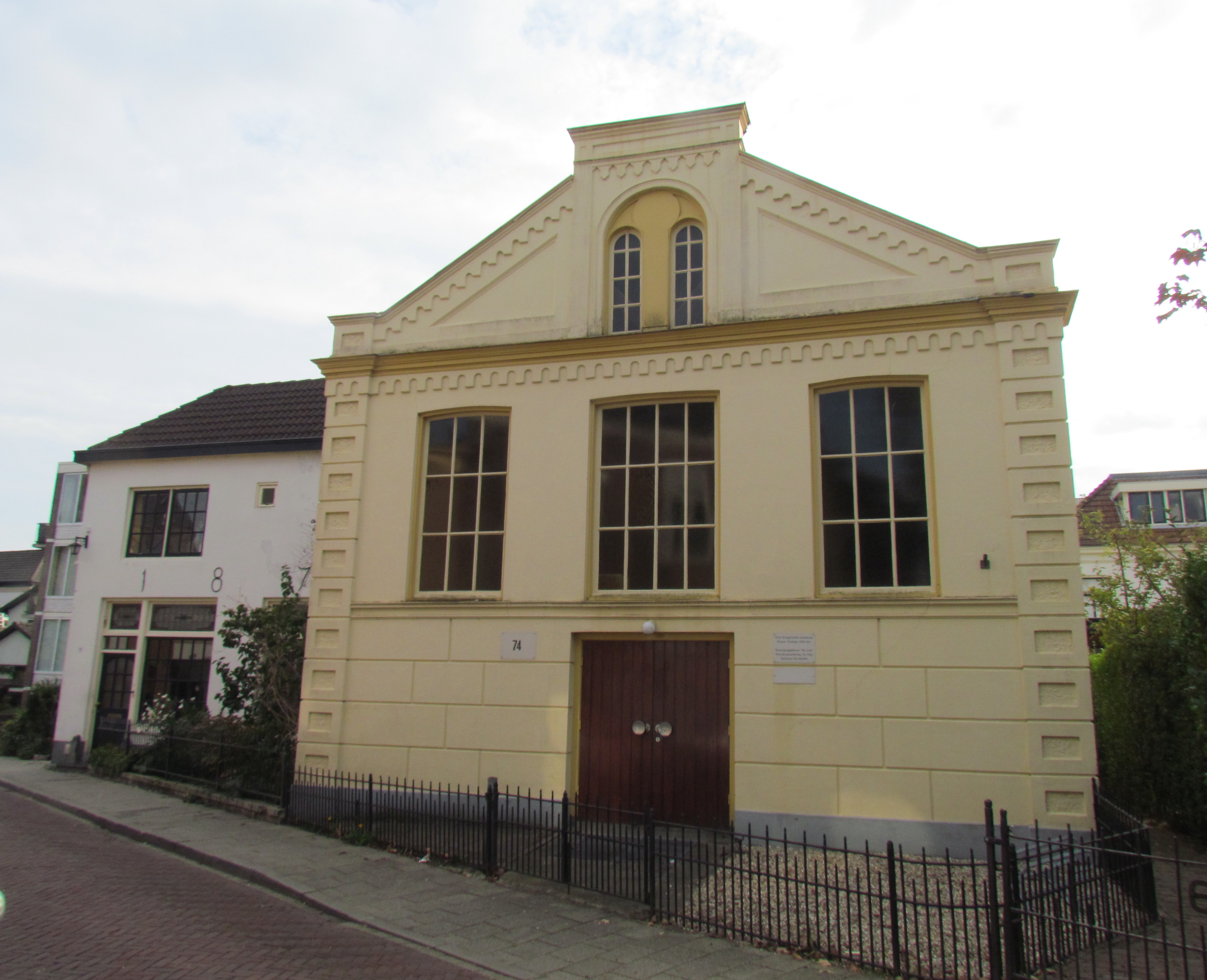 Kerkgebouw van de Vrije Evangelische Gemeente aan de Oranjestraat 74 in Velp (Gelderland)